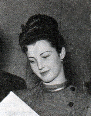 Inger Juel. Frukostklubben